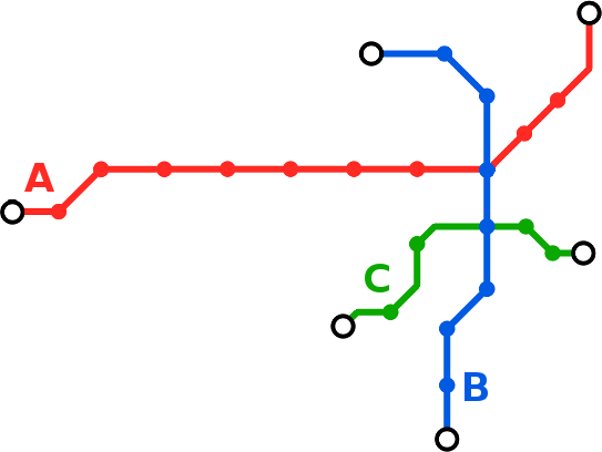 Esquema del futuro Subte de Córdoba